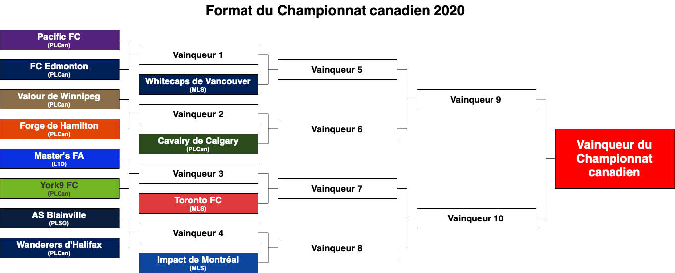 Format du Championnat canadien de soccer 2019.